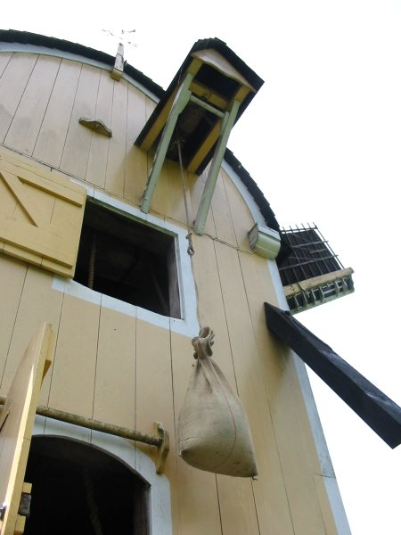 Foto: Hans de Kroon Categorie:Afbeelding molen